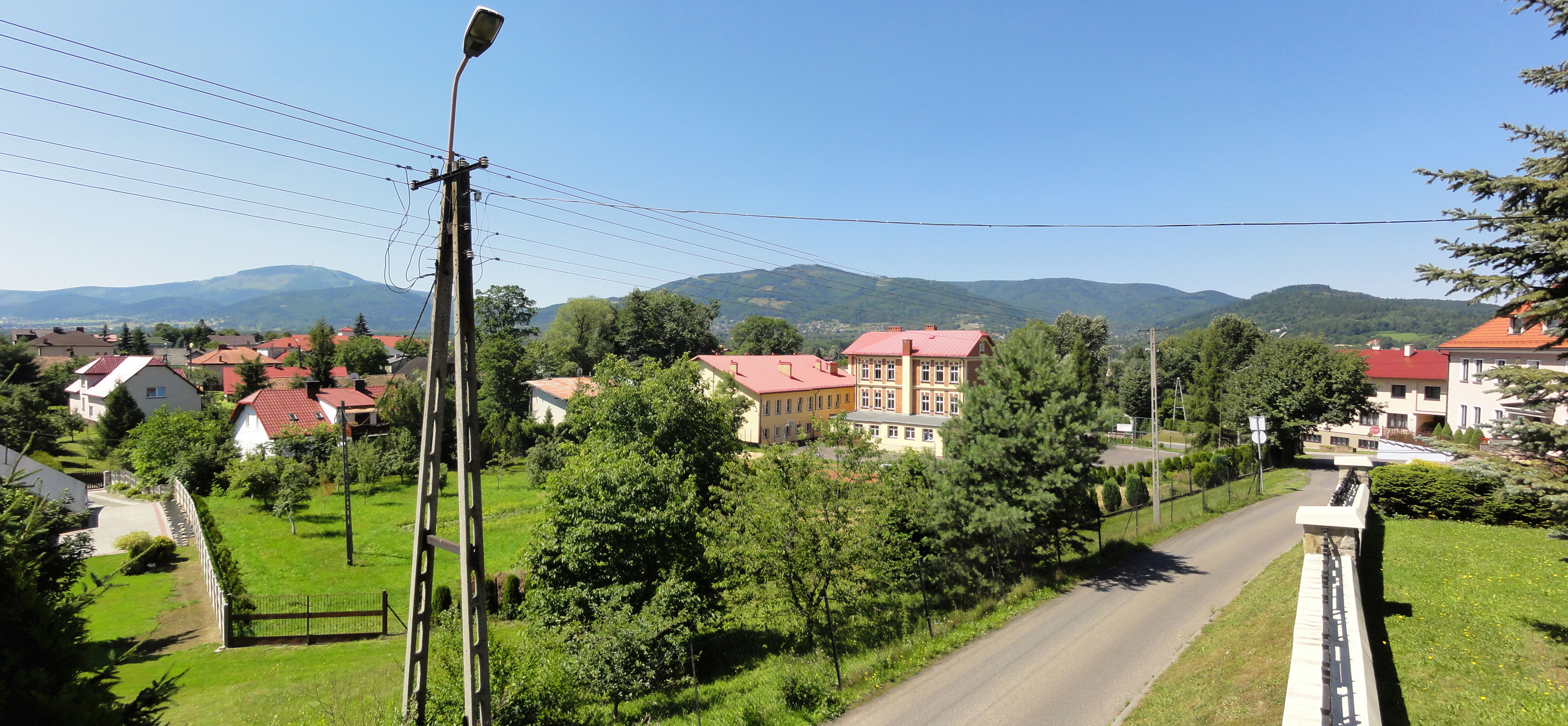 Panorama centrum Wilkowic spod kościoła, w tle Beskid Śląski ze Skrzycznem